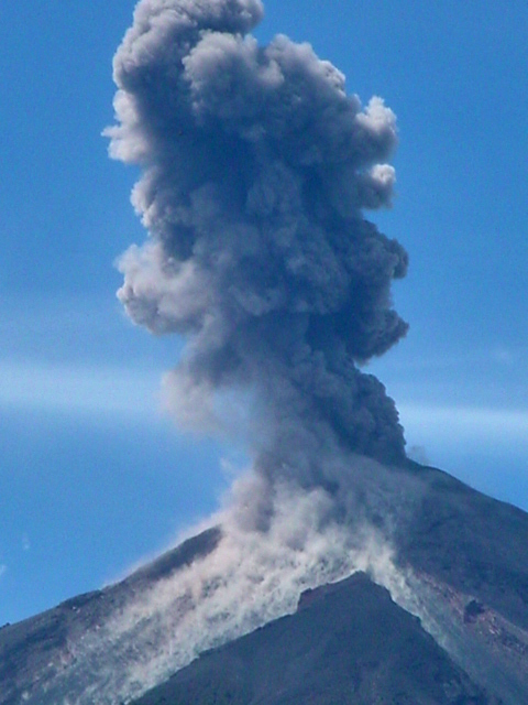 El Volcán Santiaguito se ubica en Quetzaltenango, Guatemala. Mantiene actividad desde su nacimiento a principios del Siglo XX.